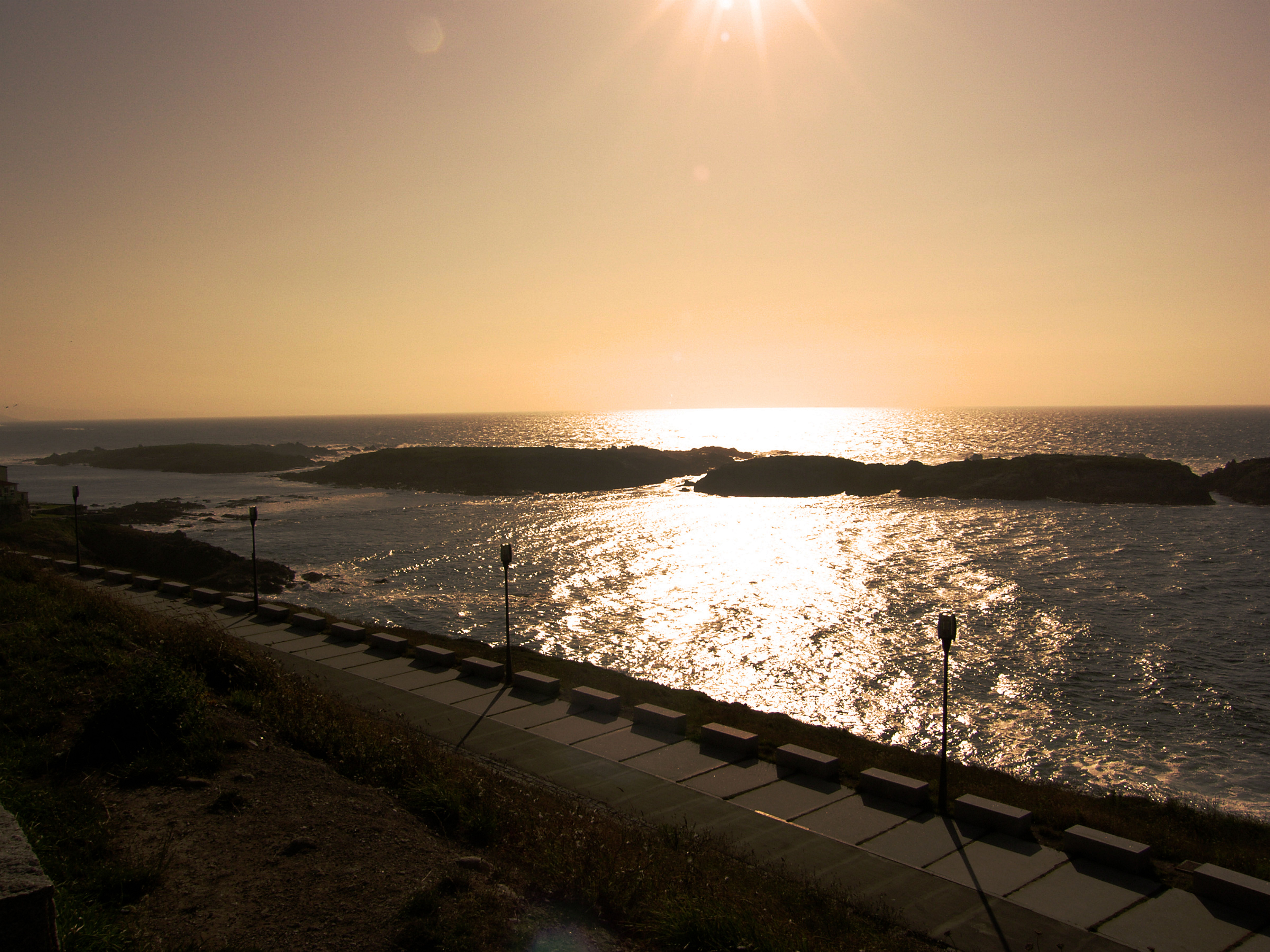 Vista parcial das Illas de San Pedro, na parroquia de Visma, no concello da Coruña.